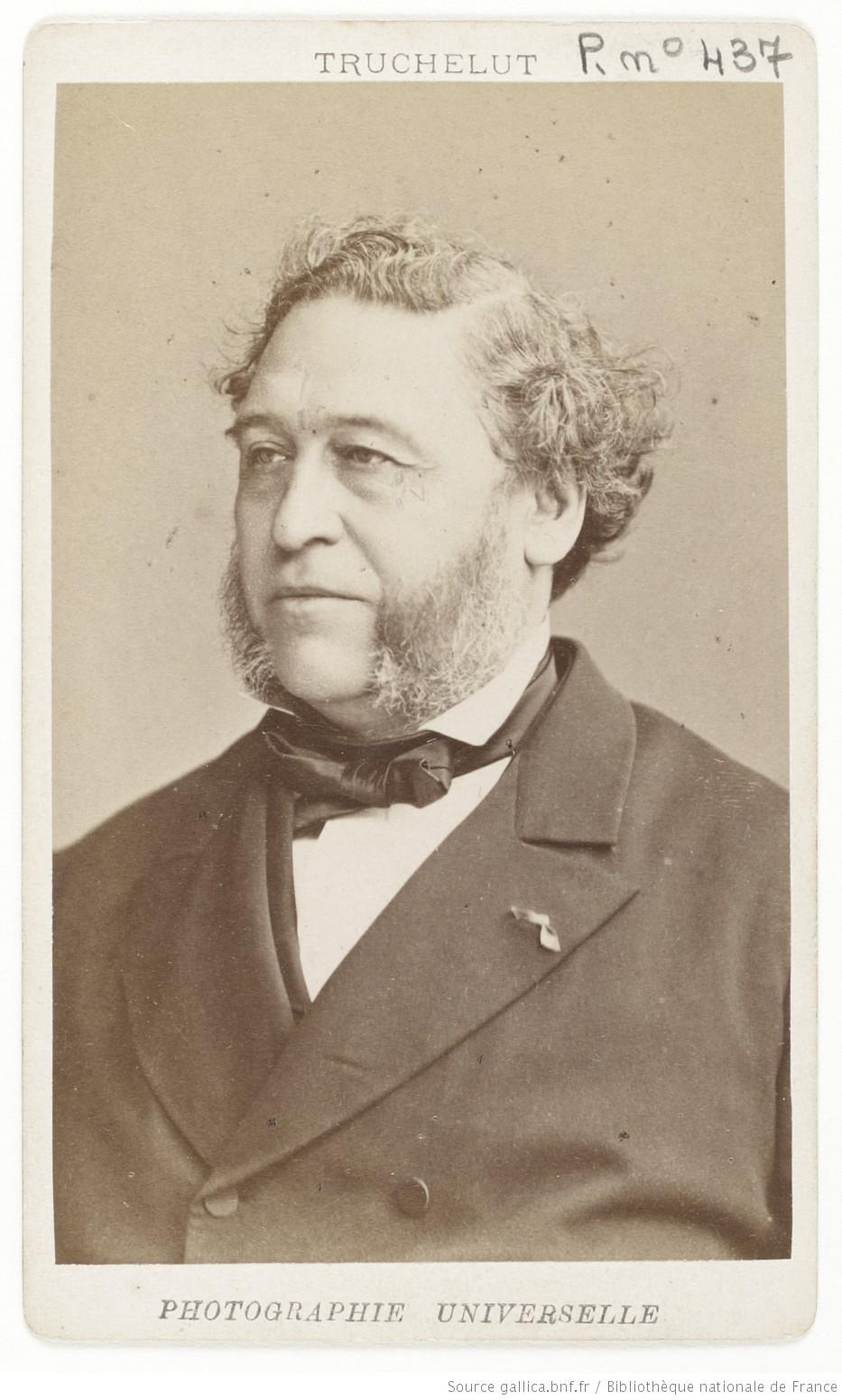 Photographie de Paul Thénard btv1b8450099k